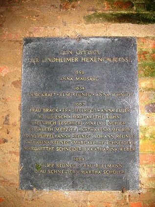 Gedenktafel am Hexenturm mit den Namen von 24 Opfern der Hexenverfolgung in Altenstadt Lindheim im Wetteraukreis, Hessen.